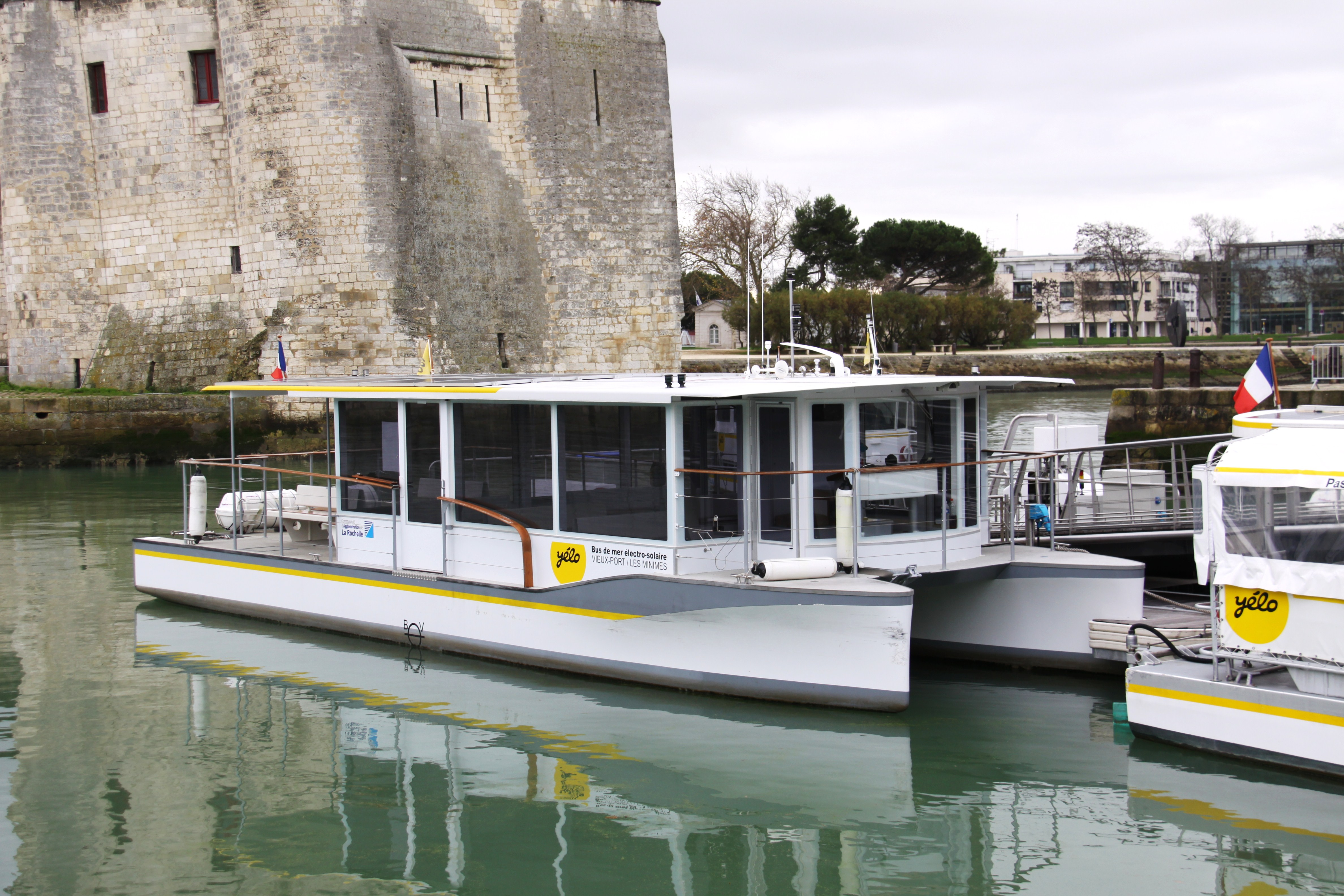 Ce bateau à propulsion électrosolaire est de type catamaran. Il a été construit en matériaux composites (verre et polyester). Il est utilisé comme navette pour effectuer la liaison maritime de courte distance (5 kilomètres allée-retour) entre le port de La Rochelle et le port de plaisance des Minimes. Sur une partie du toit, on peut apercevoir des panneaux photovoltaïques reliés à des batteries qui alimentent en électricité le moteur. Les panneaux transforment les rayons du soleil en courant électrique. Ce bateau, considéré comme un "Bus de mer", navigue à une vitesse d' environ 6 noeuds et peut transporter 75 passagers. Il a été fabriqué par l' entreprise Alternatives Energies et mis en service en avril 2009. La Rochelle, Charente Maritime, France.